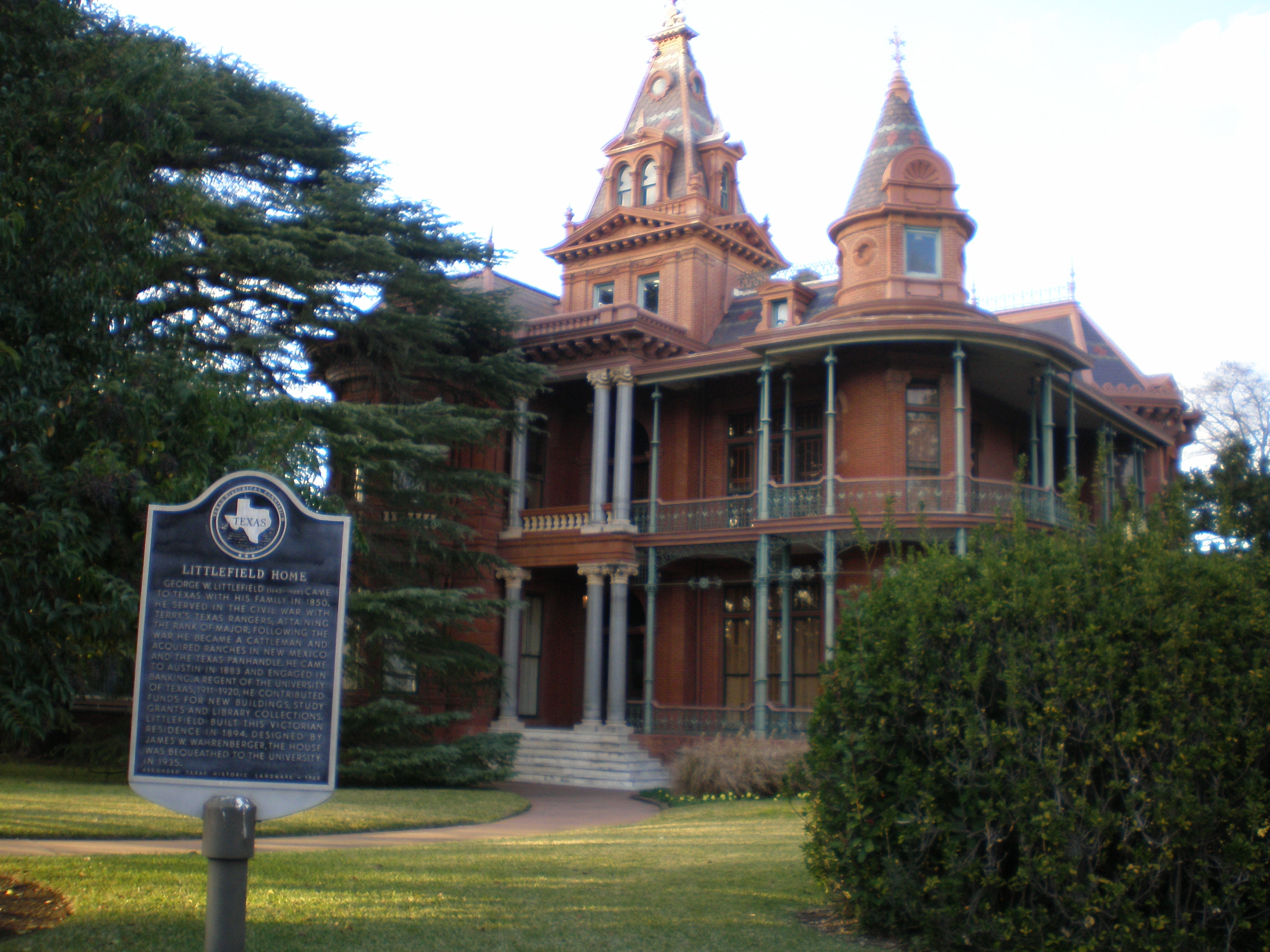 Littlefield Home es uno de los edificios situados en el campus de la Universidad de Texas en Austin.